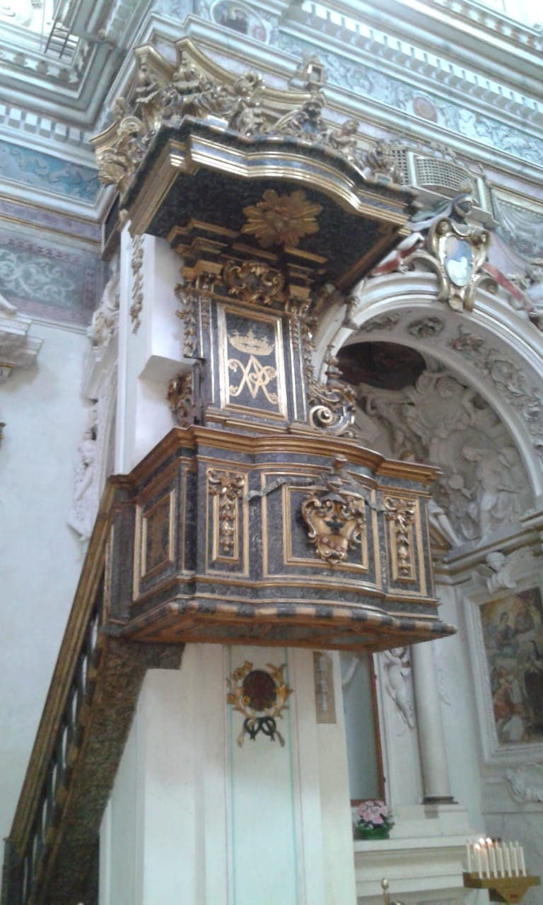 Pulpito della chiesa di Santa Chiara, a Chieti, del 1724 con balconcino in legno marmorizzato e dorato, che presenta lo stemma della celebre casa Valignani.